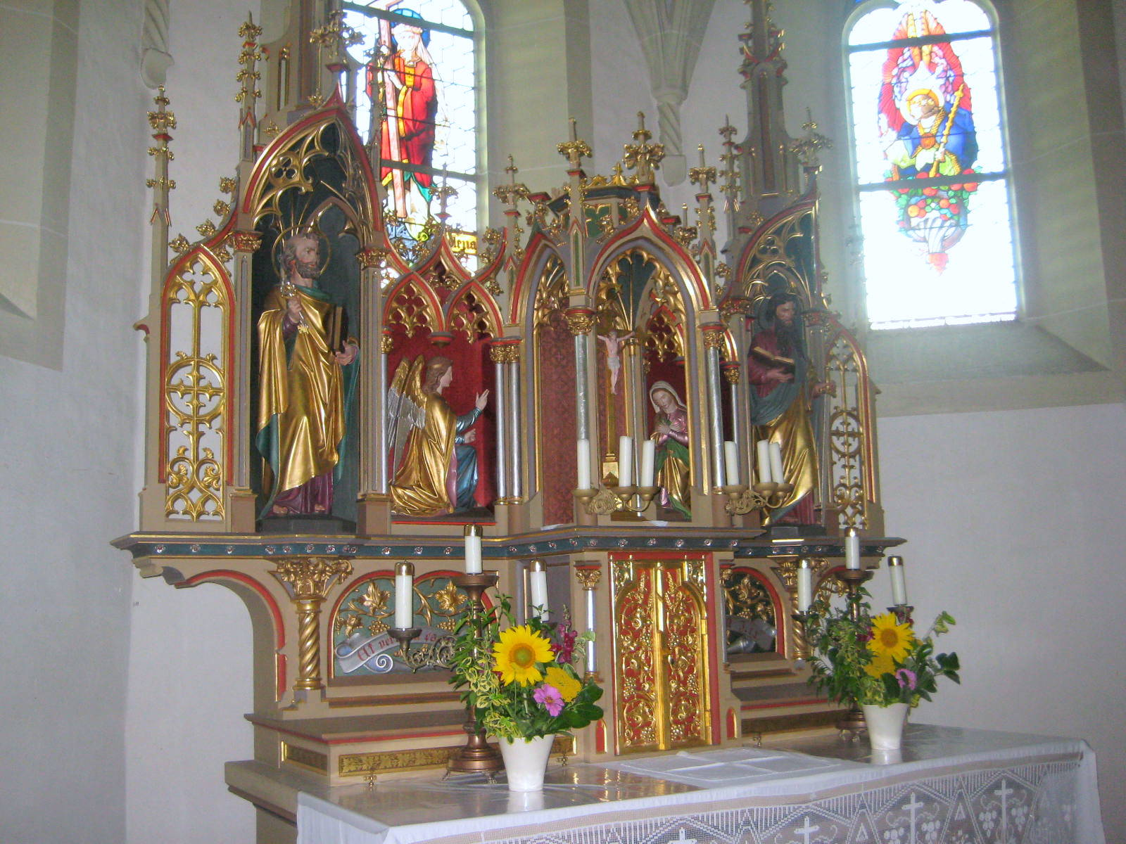 Geisenfeld liegt im Landkreis Pfattenhofen a.d. Ilm